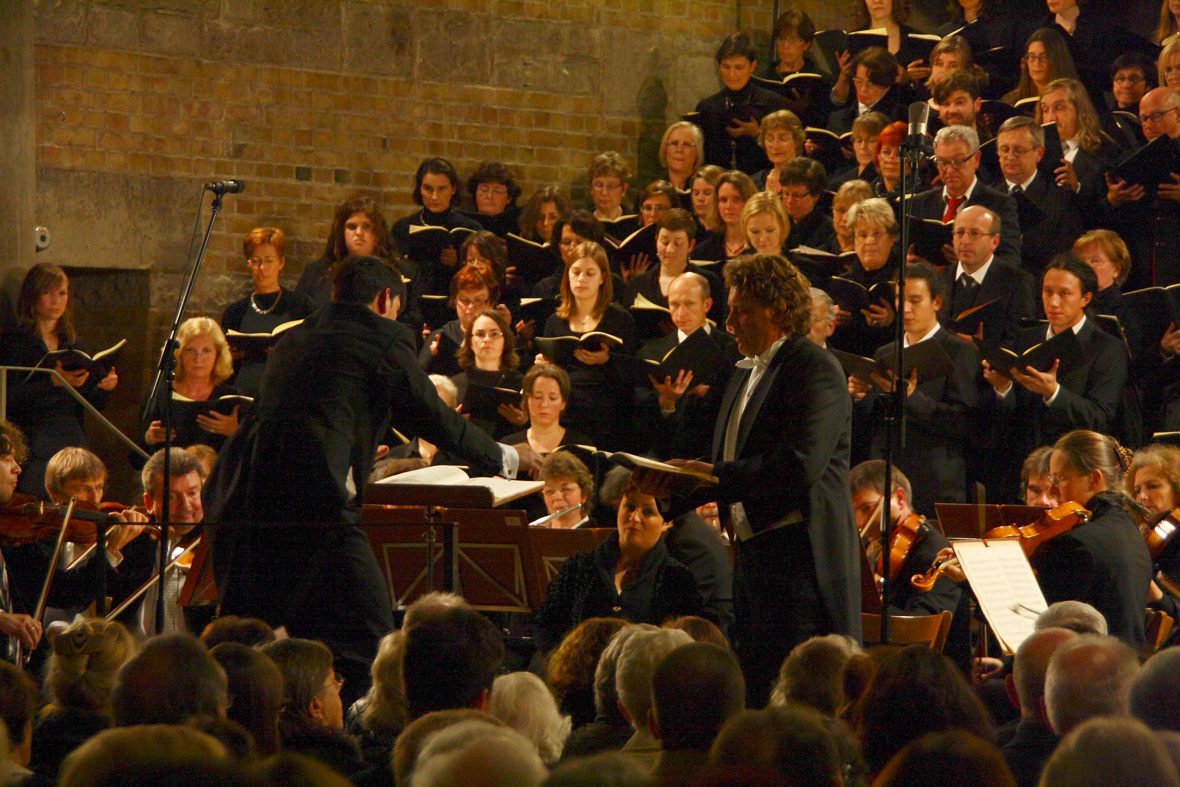 Aufführung des deutschen Requiems in der Kirche Johanniskirche. Heiko Trinsinger, Bariton.